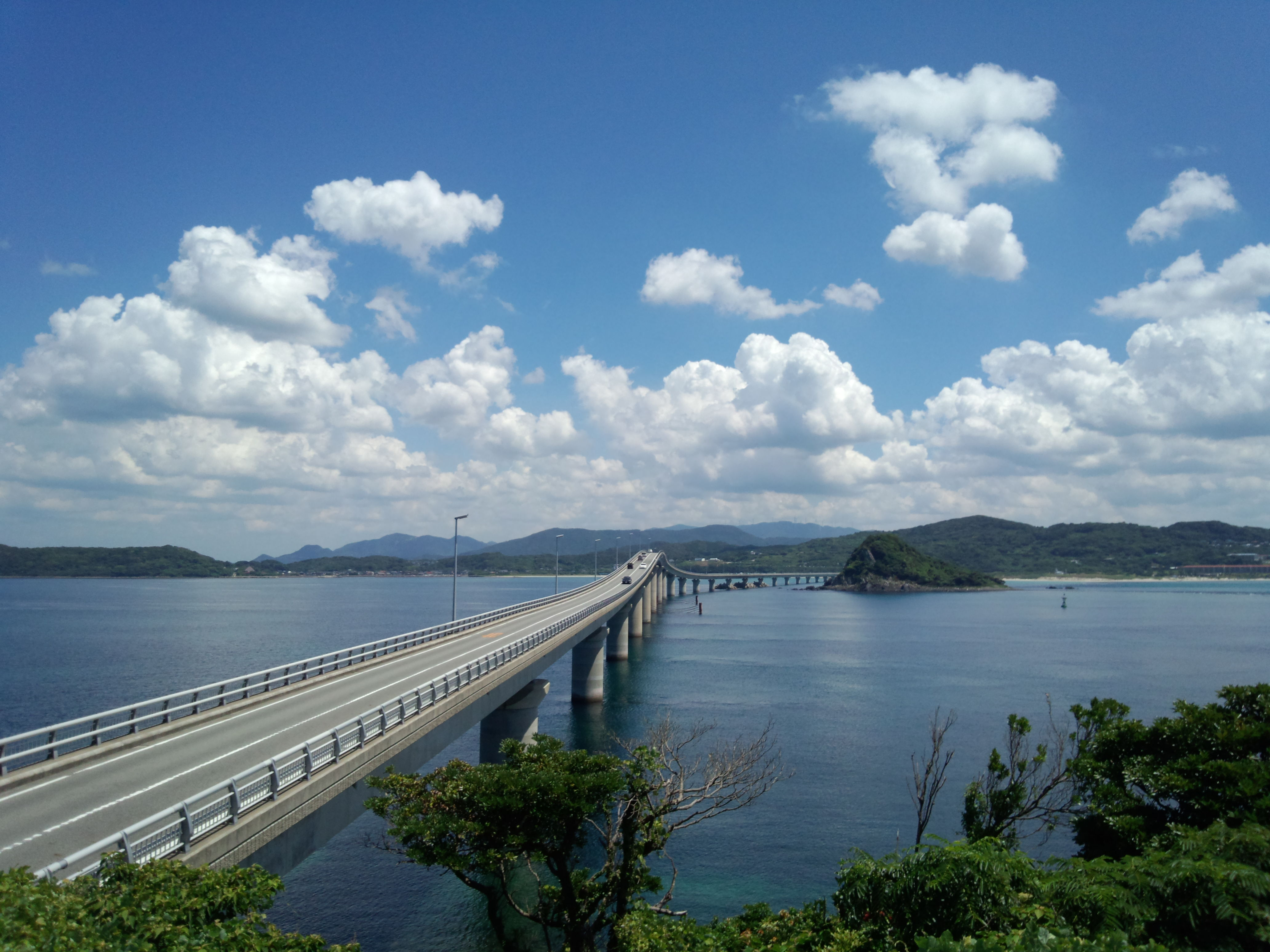 山口県下関市にある角島大橋を角島側より本土方面にむけ撮影した